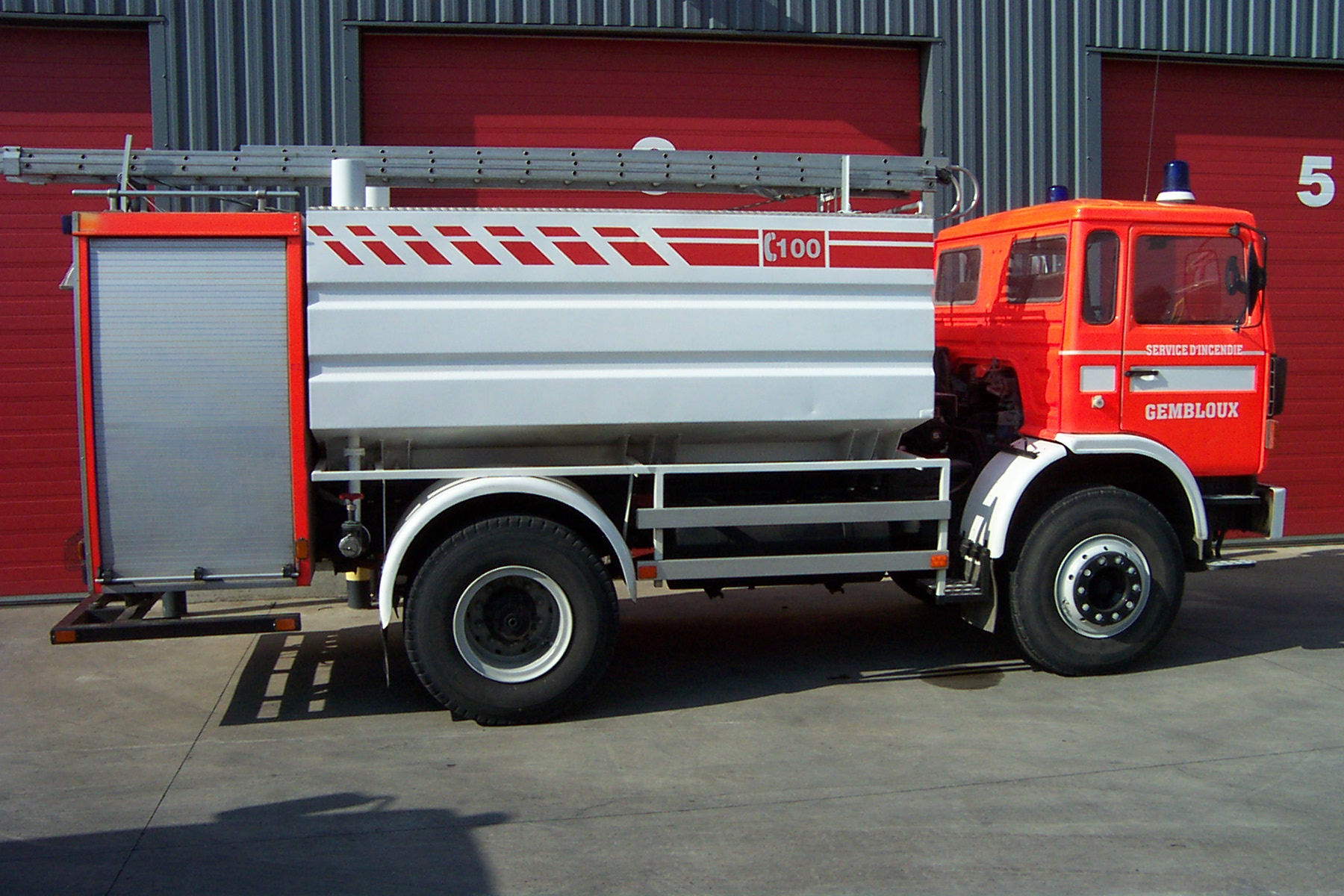 Camion citerne de 8000 litres d'eau des pompiers de Gembloux, en Belgique.